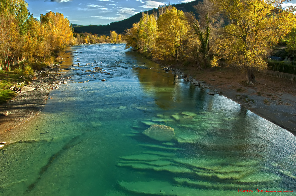 Otoño en el río Ara a su paso por Boltaña